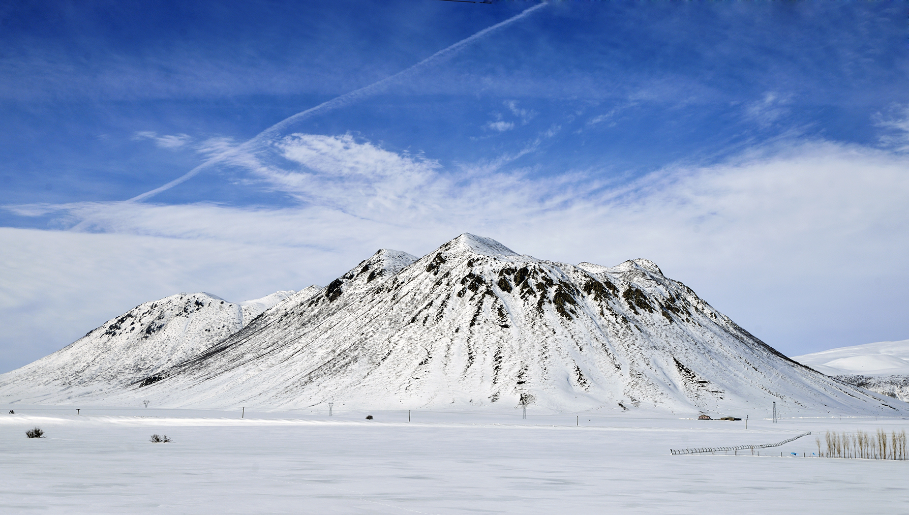 Kurdî: Ev çiya di navbera Bêdlîs,Tetwan û Norşînê de li kêleka Çiyayê Golên Nemrûdê ên krater e.